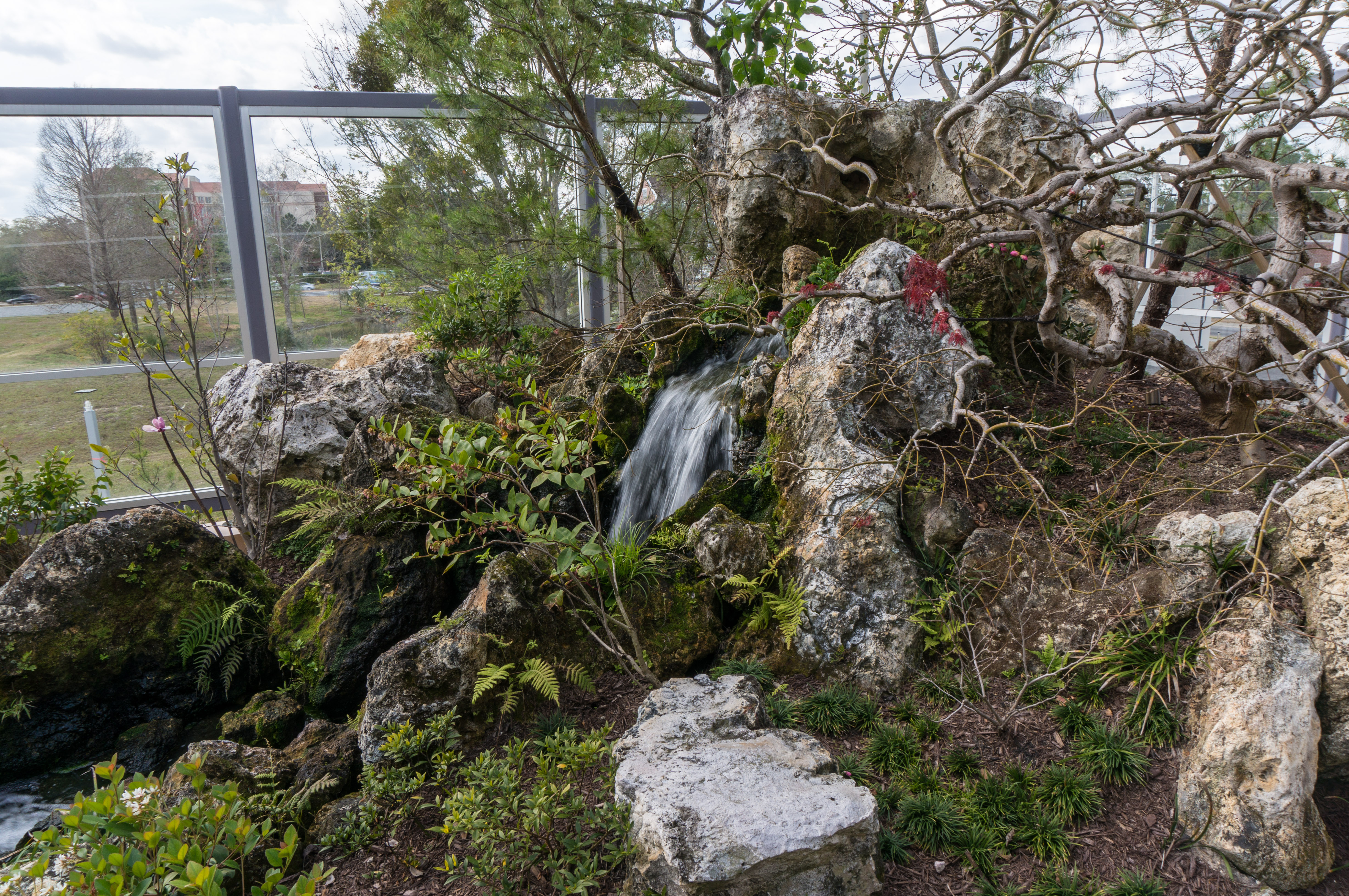 harn-02625